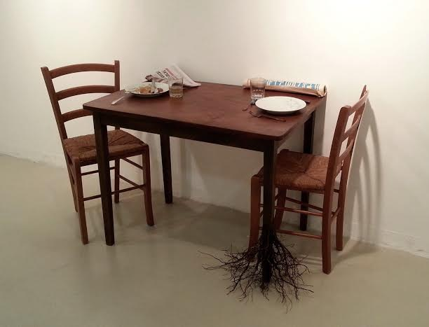 ללא כותרת. 2013 מיצב – טכניקה מעורבת, רדי מייד 180 / 77 / 80 ס"מ